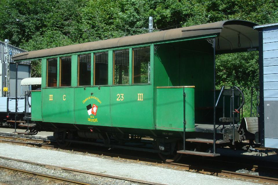 Historischer Personenwagen C2 23 der ehemaligen Chemins de fer électriques de la Gruyère (CEG), heute Freiburgische Verkehrsbetriebe (TPF), bei der Museumsbahn Blonay-Chamby (BC) Chamby-Musée (Chaulin) im Frühling 2010.